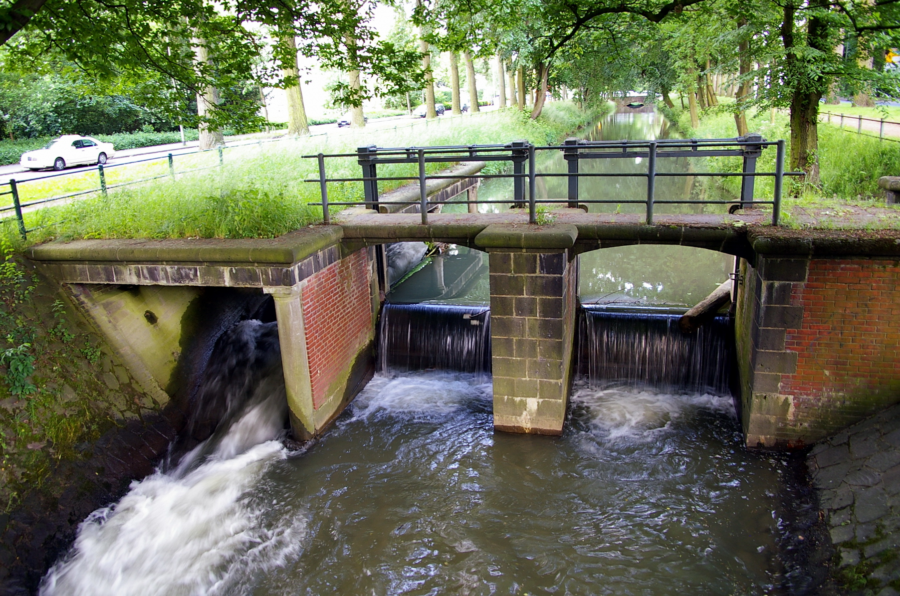 Düssel in Düsseldorf, Heinrichstraße Genehmigung: siehe unten Sonstiges: Panoramafreiheit